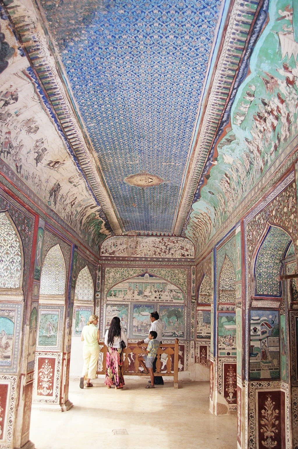 historische, original erhaltene Deckenmalerei im Garh Palace von Bundi